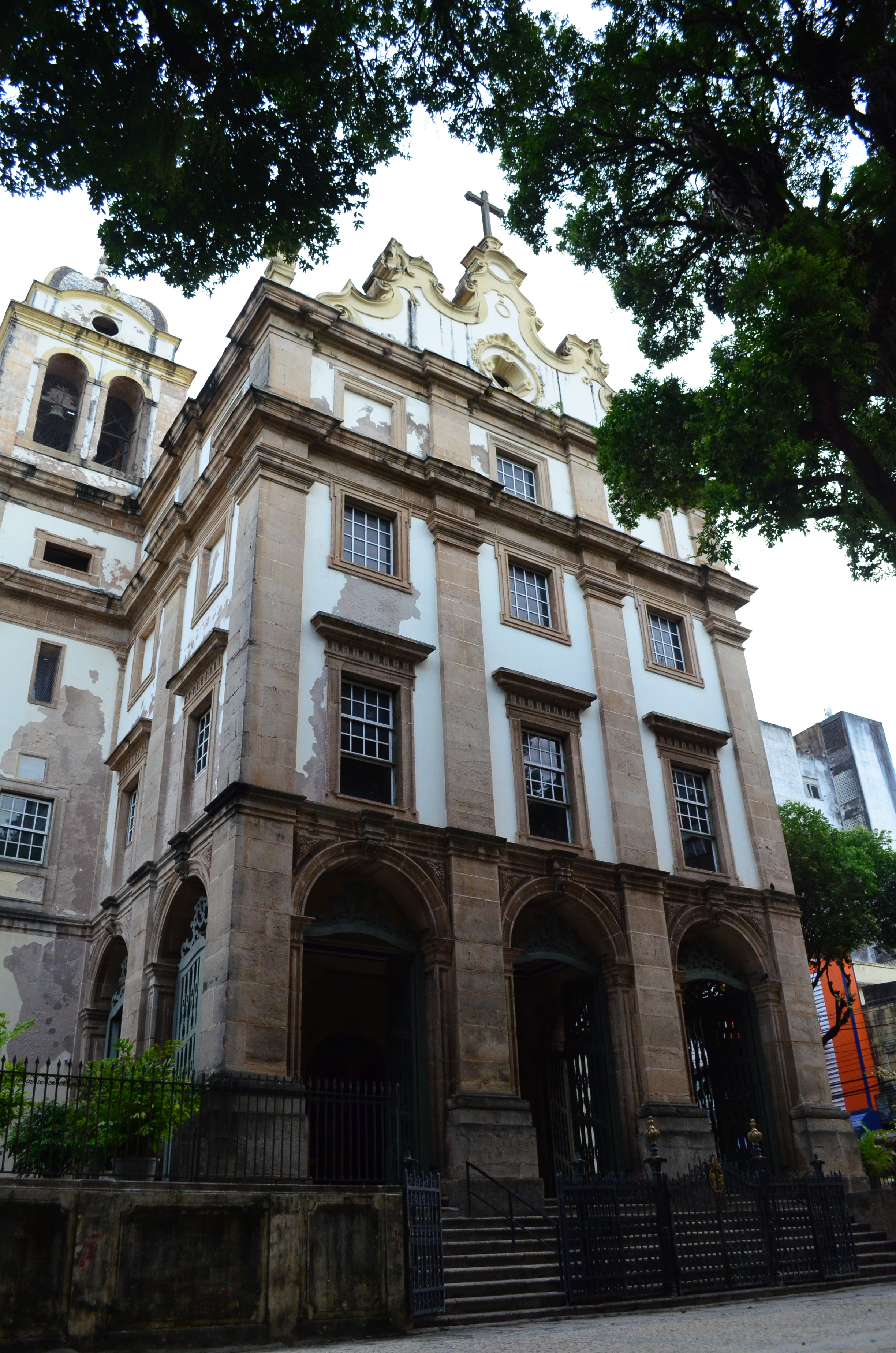 Basílica Arquiabacial de São Sebastião. Foto: Tatiana Azeviche